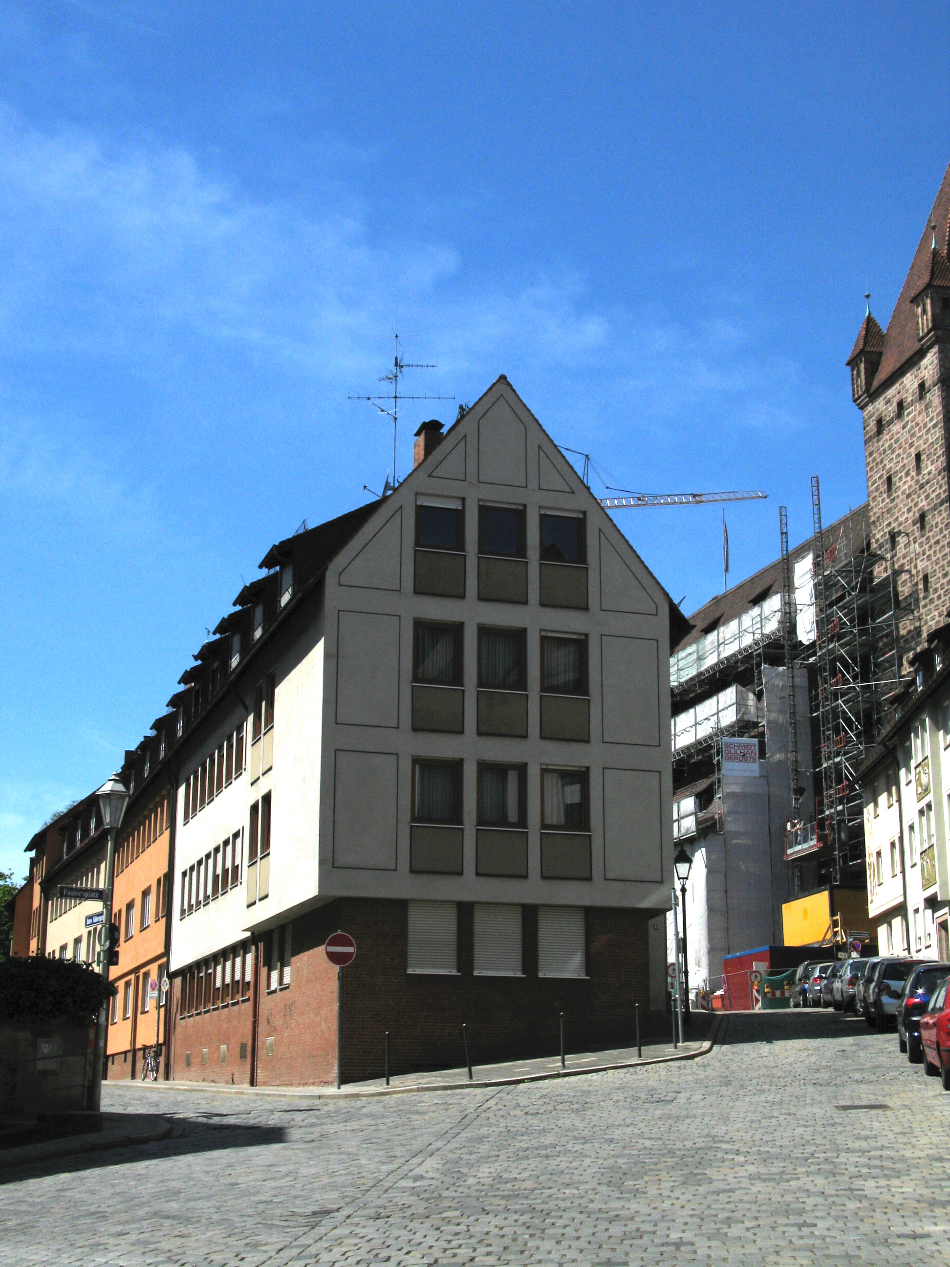 Nürnberg-St. Sebald, Haus Obere Söldnersgasse 6 (ehem. Toplerhaus).